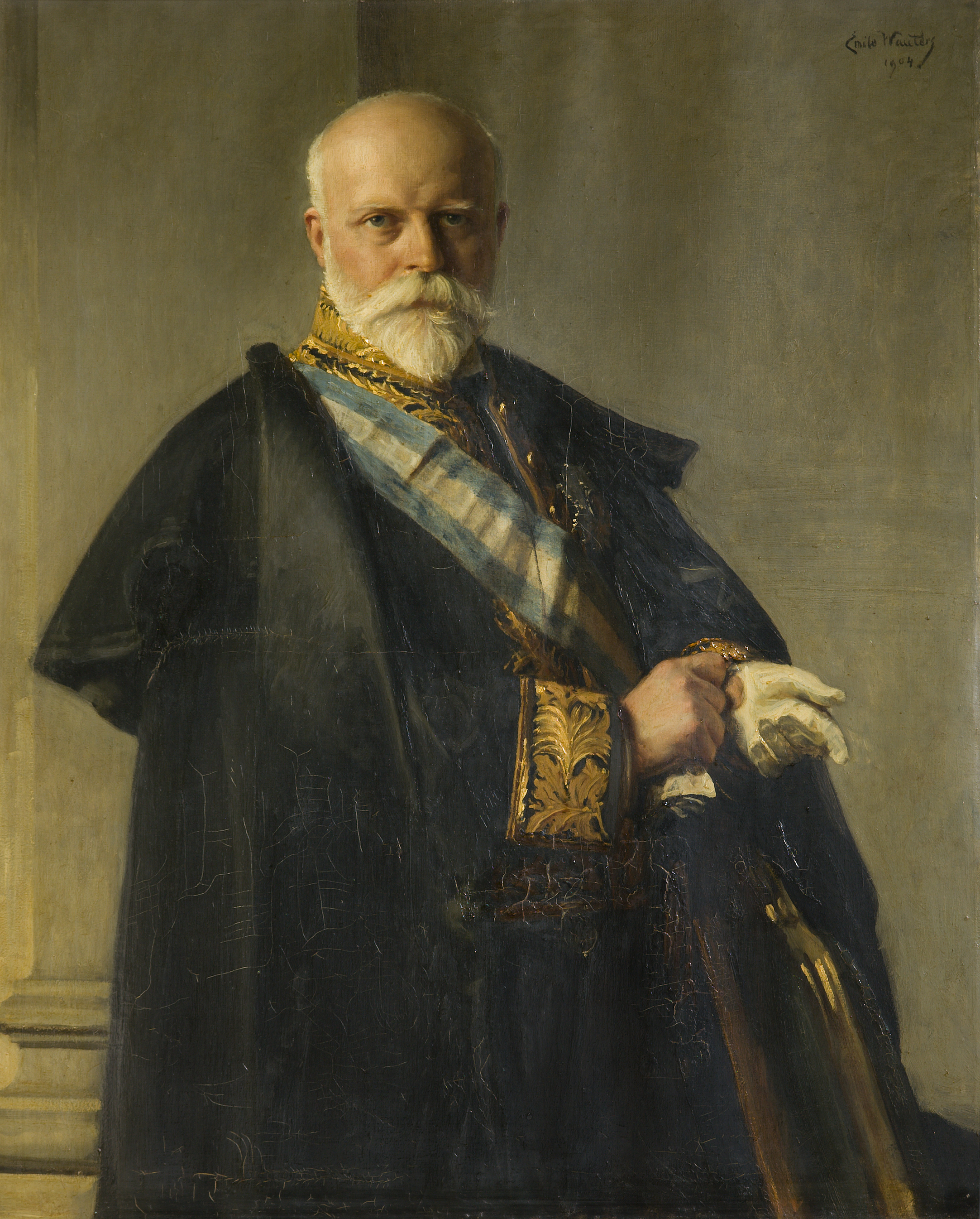 Portret van Joseph hertog d'Ursel et d'Hoboken, voorzitter van de Senaat (1899 - 1903)